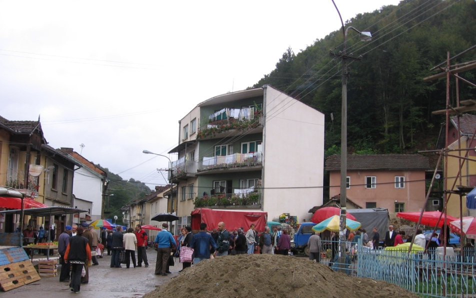 Пијачни дан у Клисури (Сурдулица) - Market Day in Klisura (Surdulica)